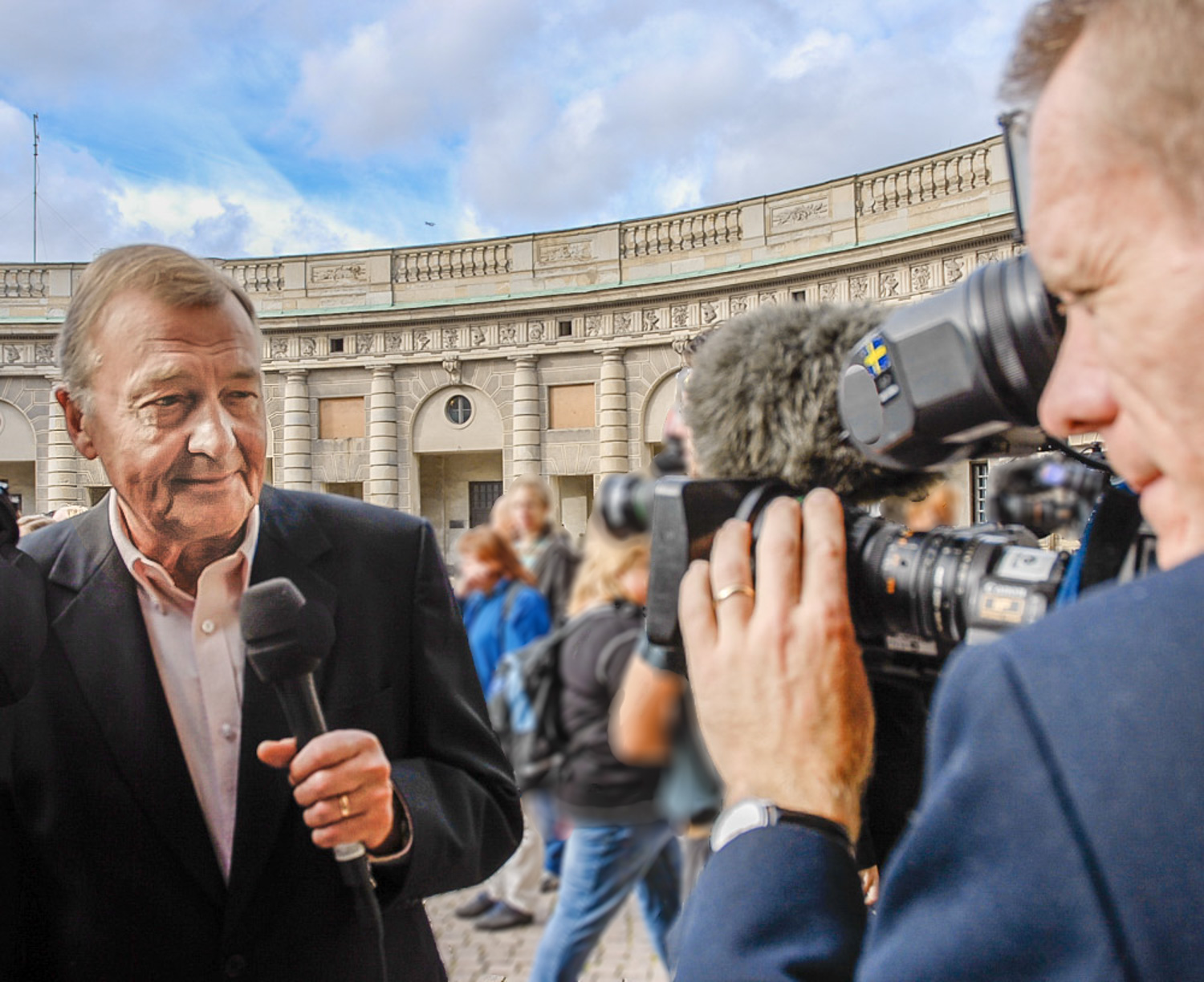 Bo Holmström rapporterar i samband med att den nya regeringen Reinfeldt tillträder den 6 oktober 2006.